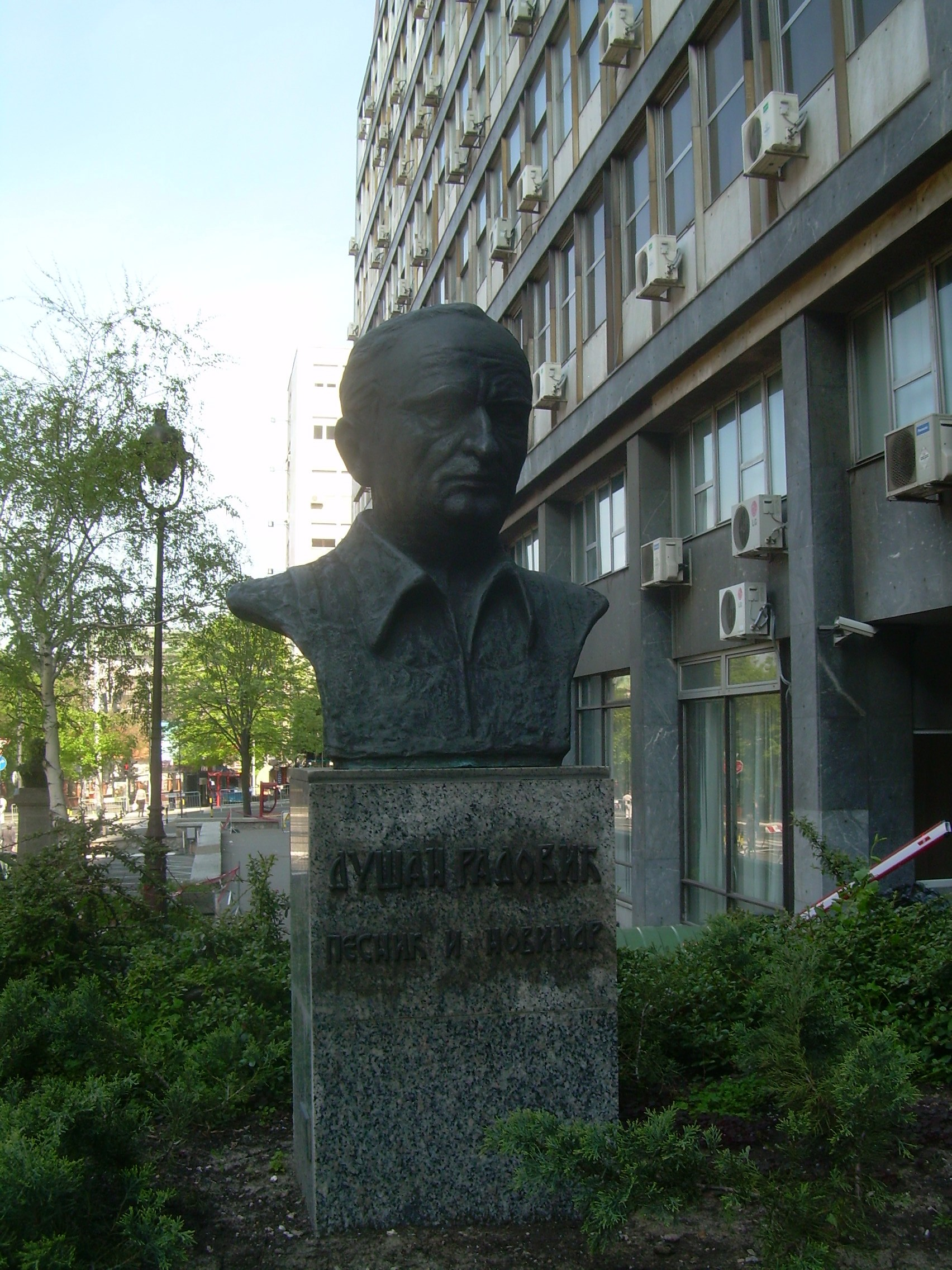 Споменик Душку Радовићу у Београду. Снимљено у априлу 2010.